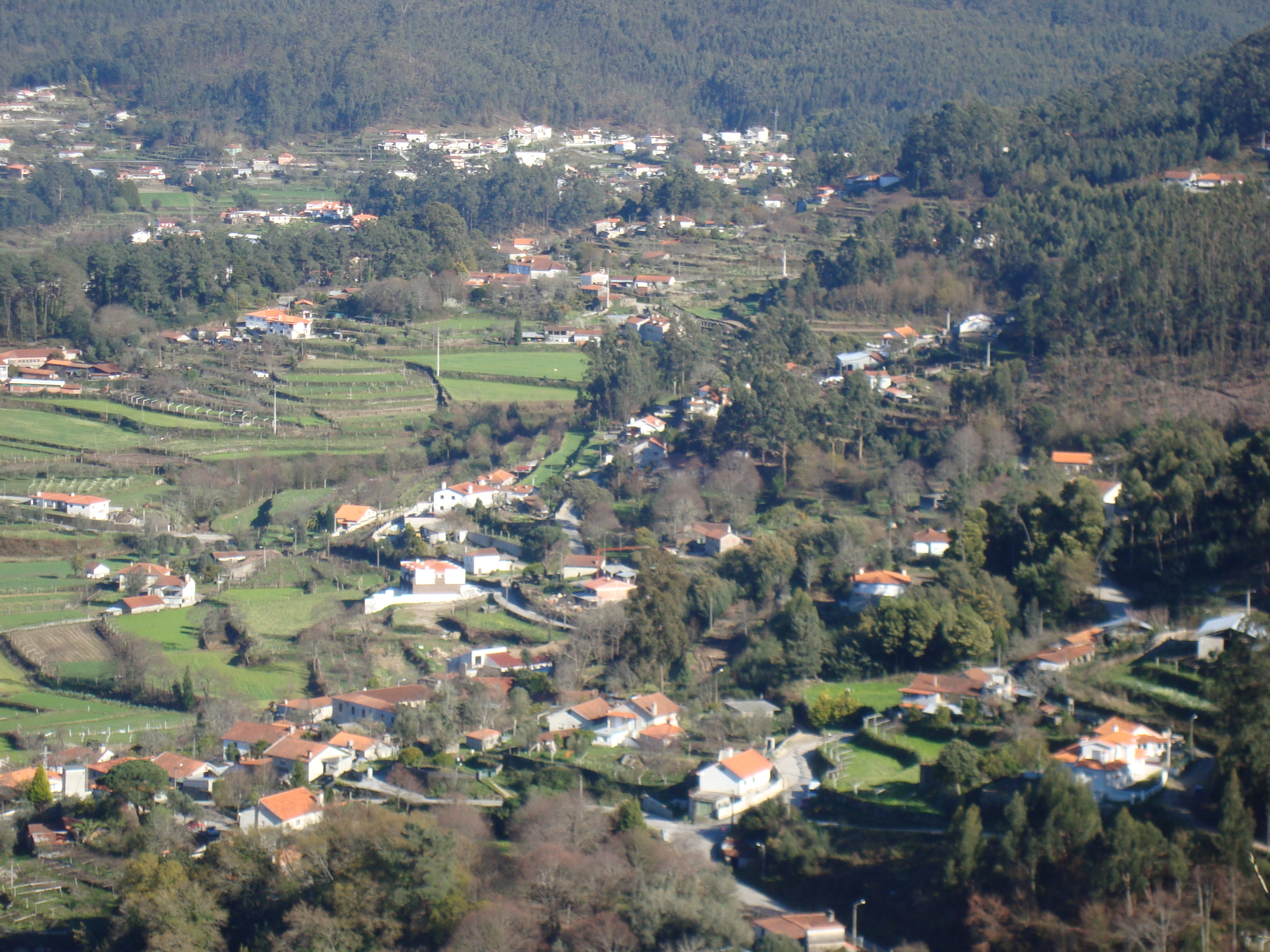 Vista panorâmica da zona do Outeiro em Quintiães, Barcelos.